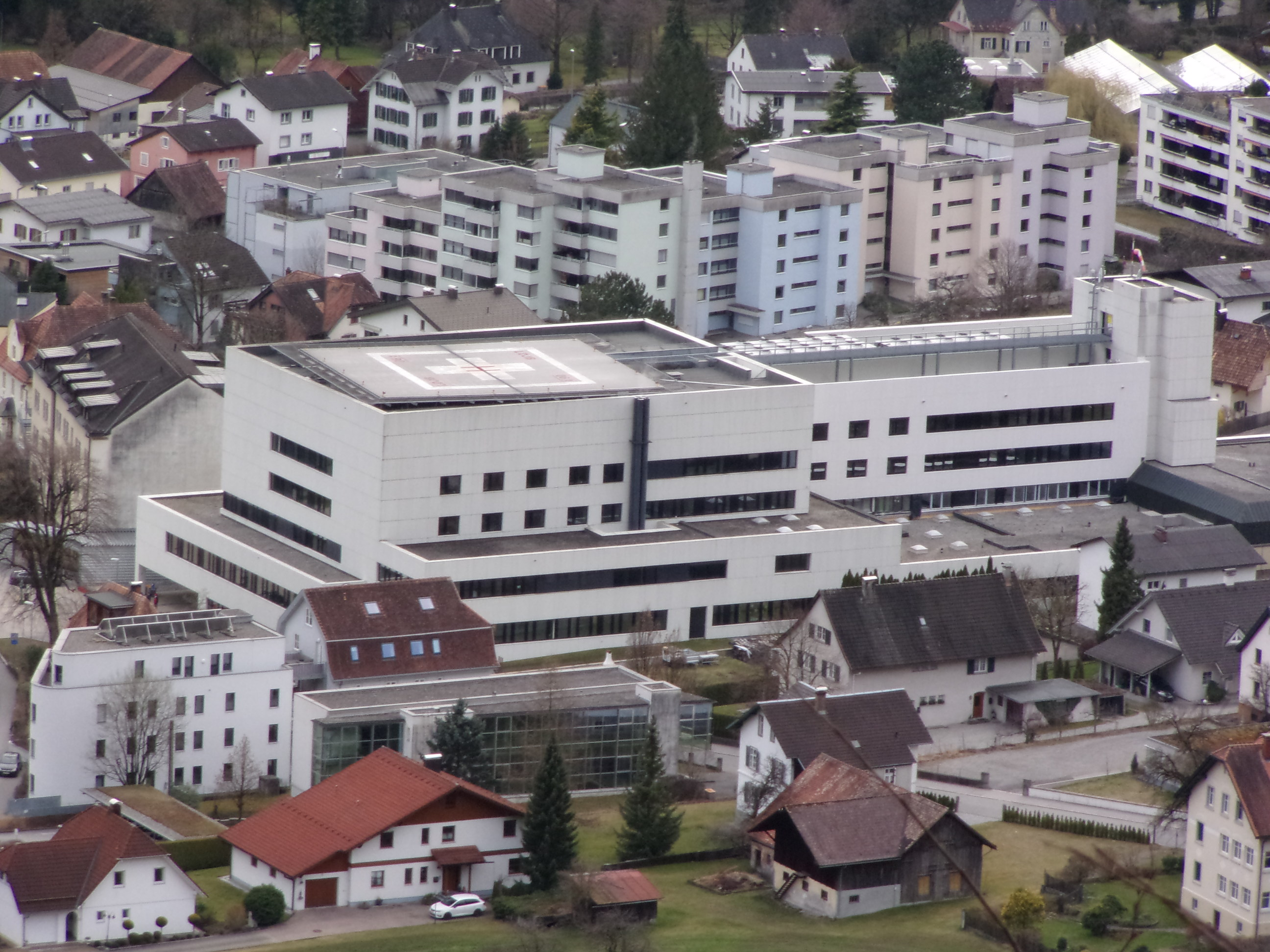 LKH Bludenz